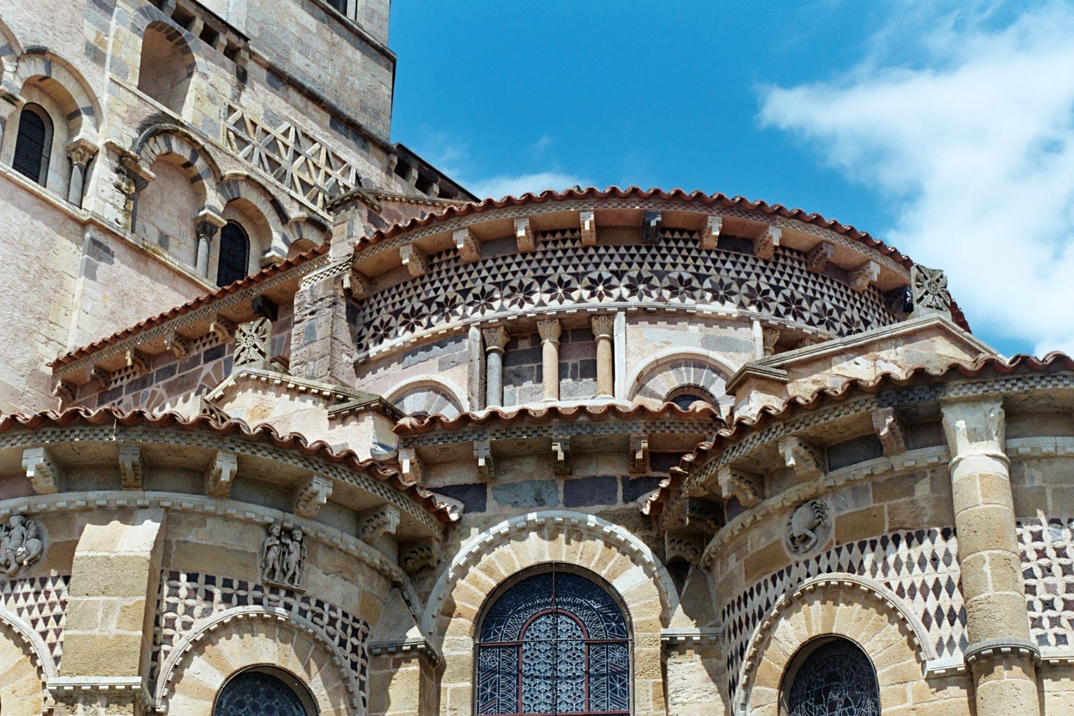 France - Auvergne - Puy-de-Dôme - Église Saint-Austremoine d'Issoire